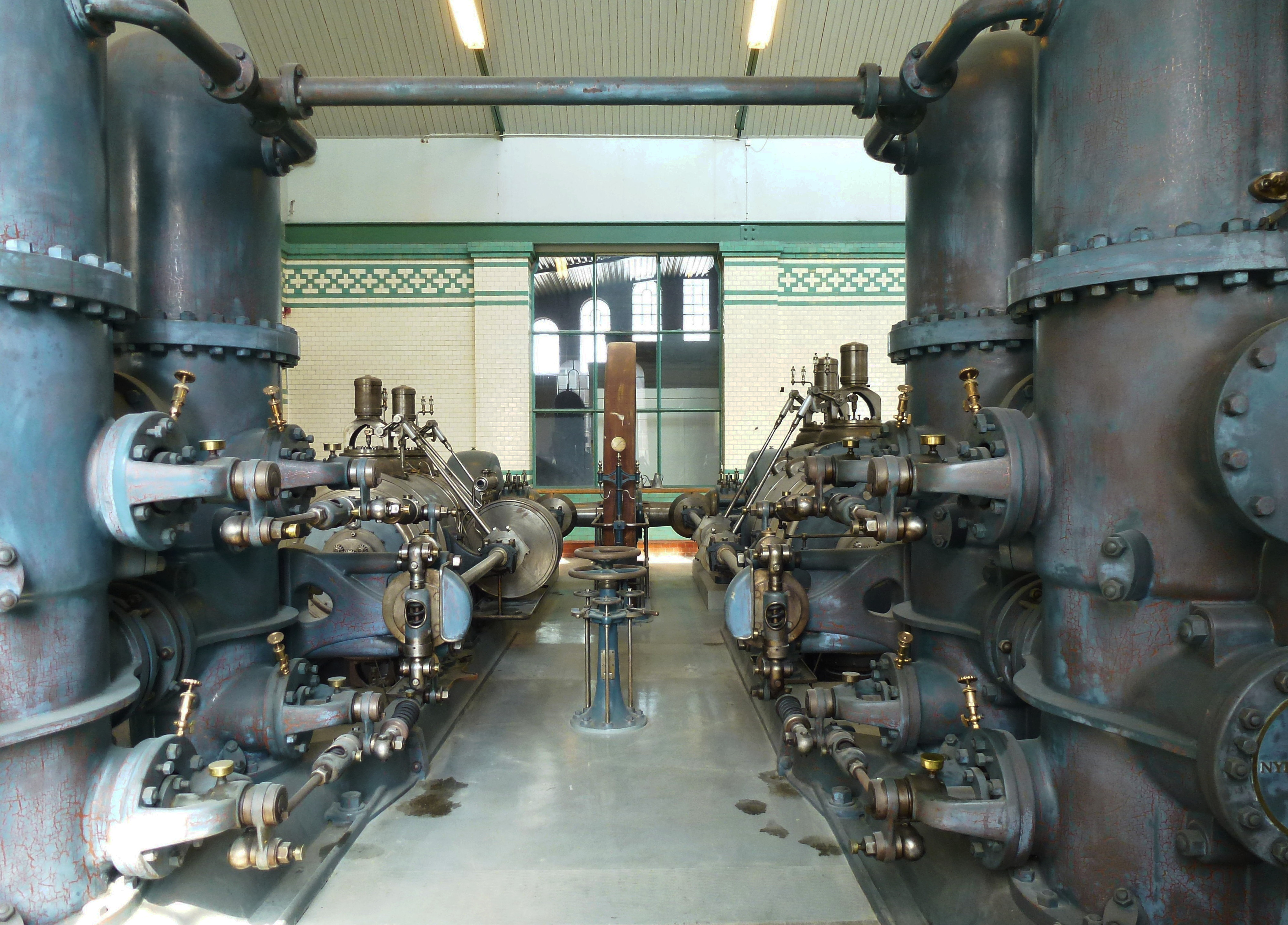 Norsborgs vattenverk maskinhallen, gamla pumpen